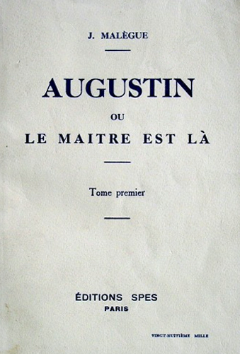 Couverture du tome 1 de Augustin ou Le Maître est là, Joseph Malègue. (1ère éd. 1933, réed 1940)